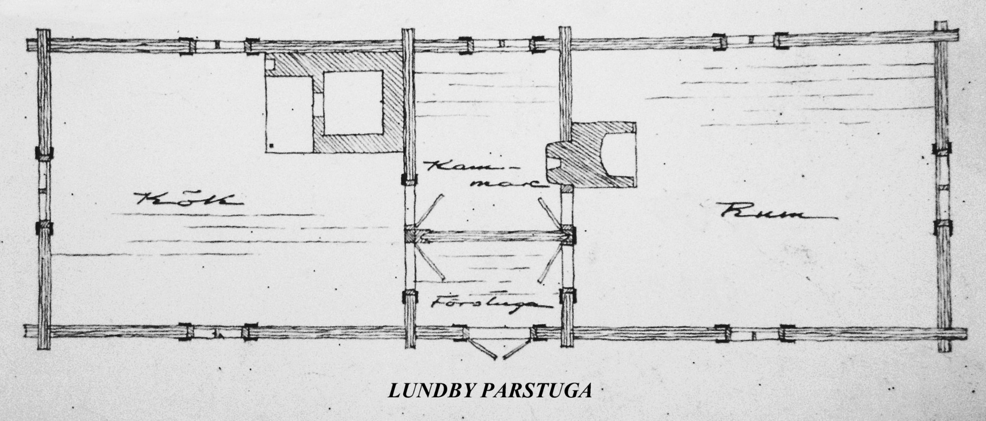 Lundby parstuga planritning uppsatt på informationstavla vid stugan